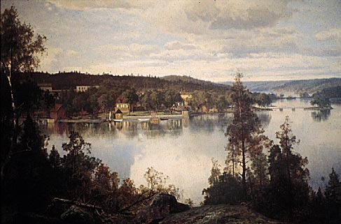 Duvnäsviken med Prästgården och Övre Gården. Oljemålning av Edward Berg (1828-1880)